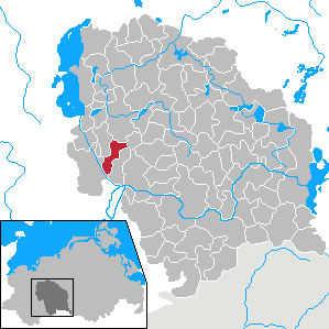 Göhren in Mecklenburg-Vorpommern - District Parchim